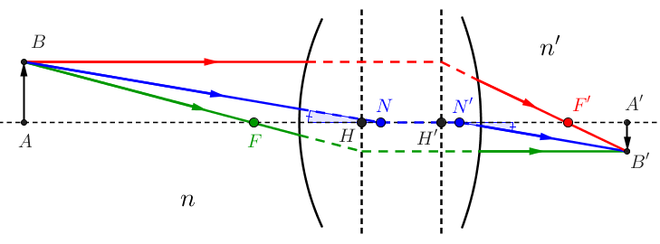 illustration système centré convergent